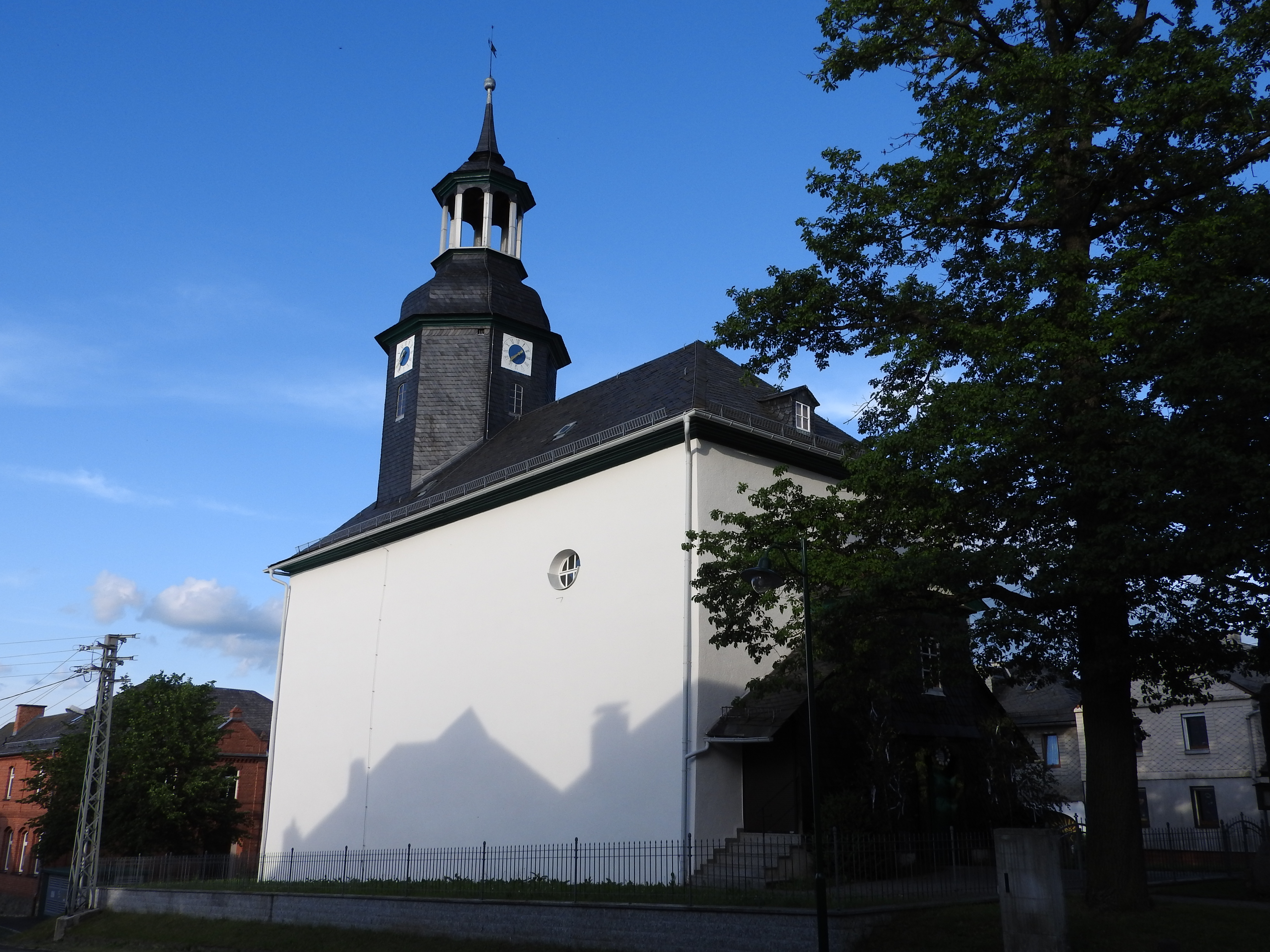 Kirche in Liebengrün, Remptendorf, Thüringen